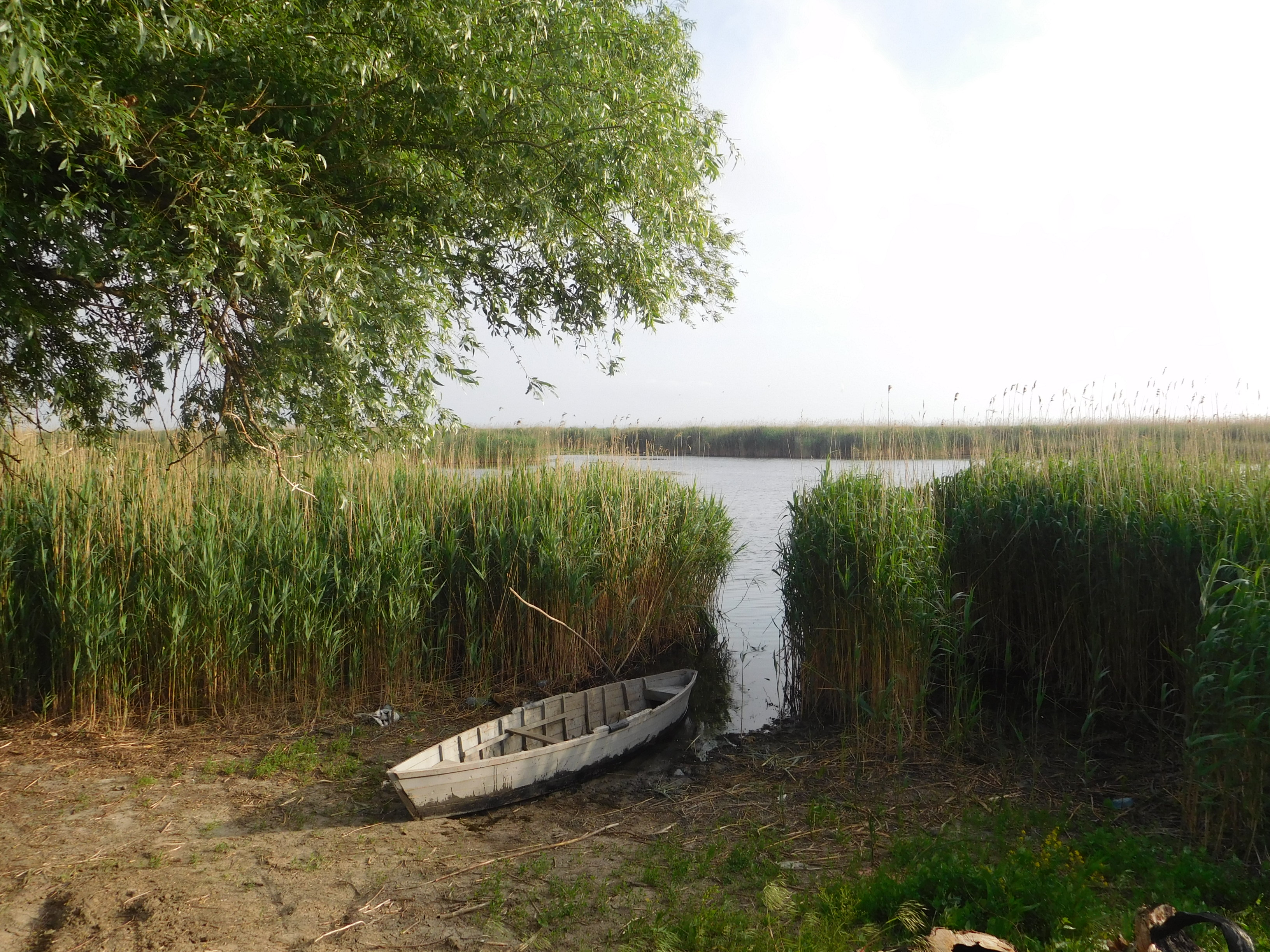 оз. Картал